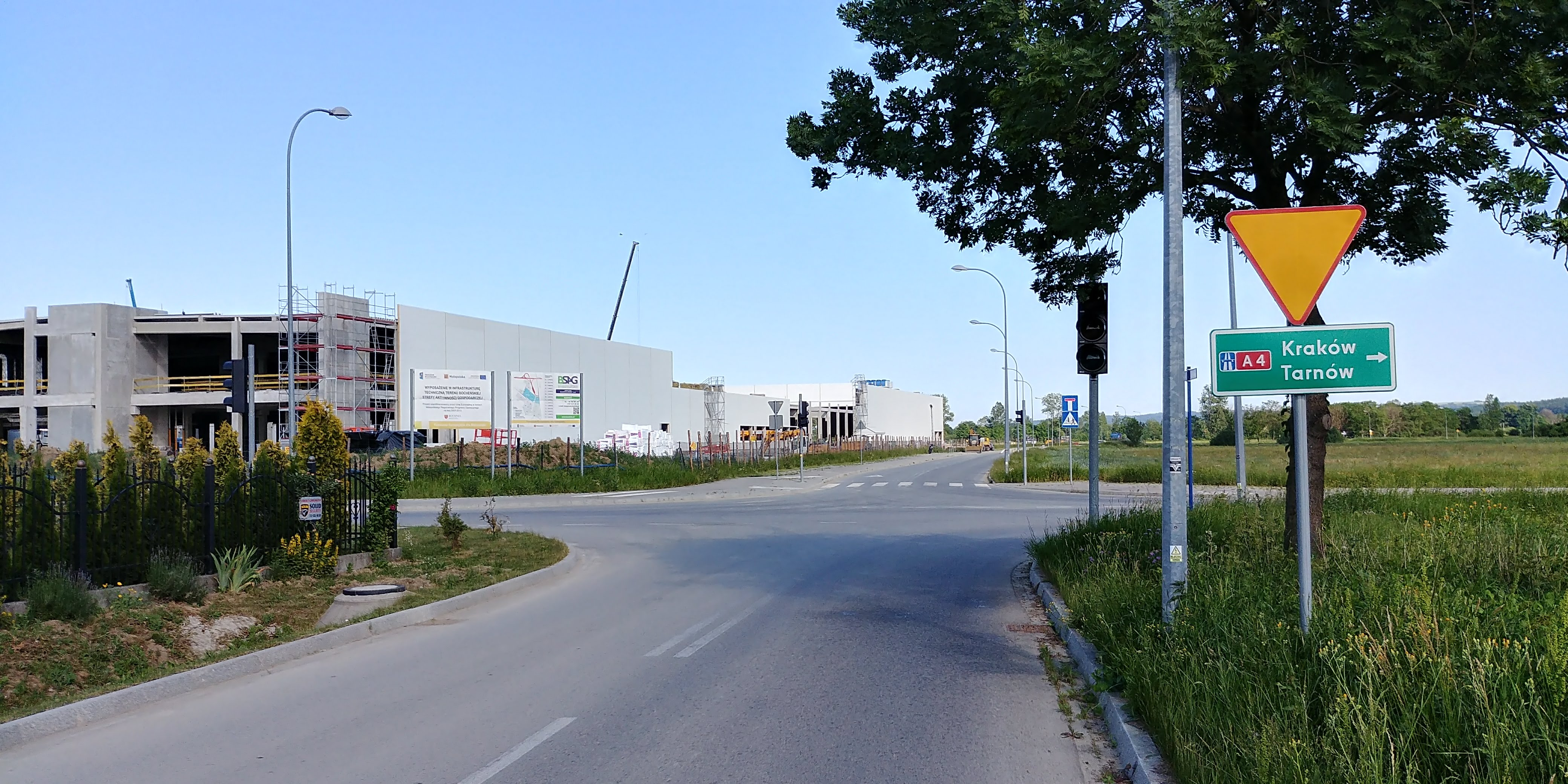 Skrzyżowanie na terenie Bocheńskiej Strefy Aktywności Gospodarczej.